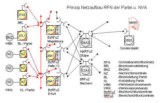 Prinzip Netzaufbau der Partei u.d. NVA mit der Bereichsrichtunkzentrale Süd